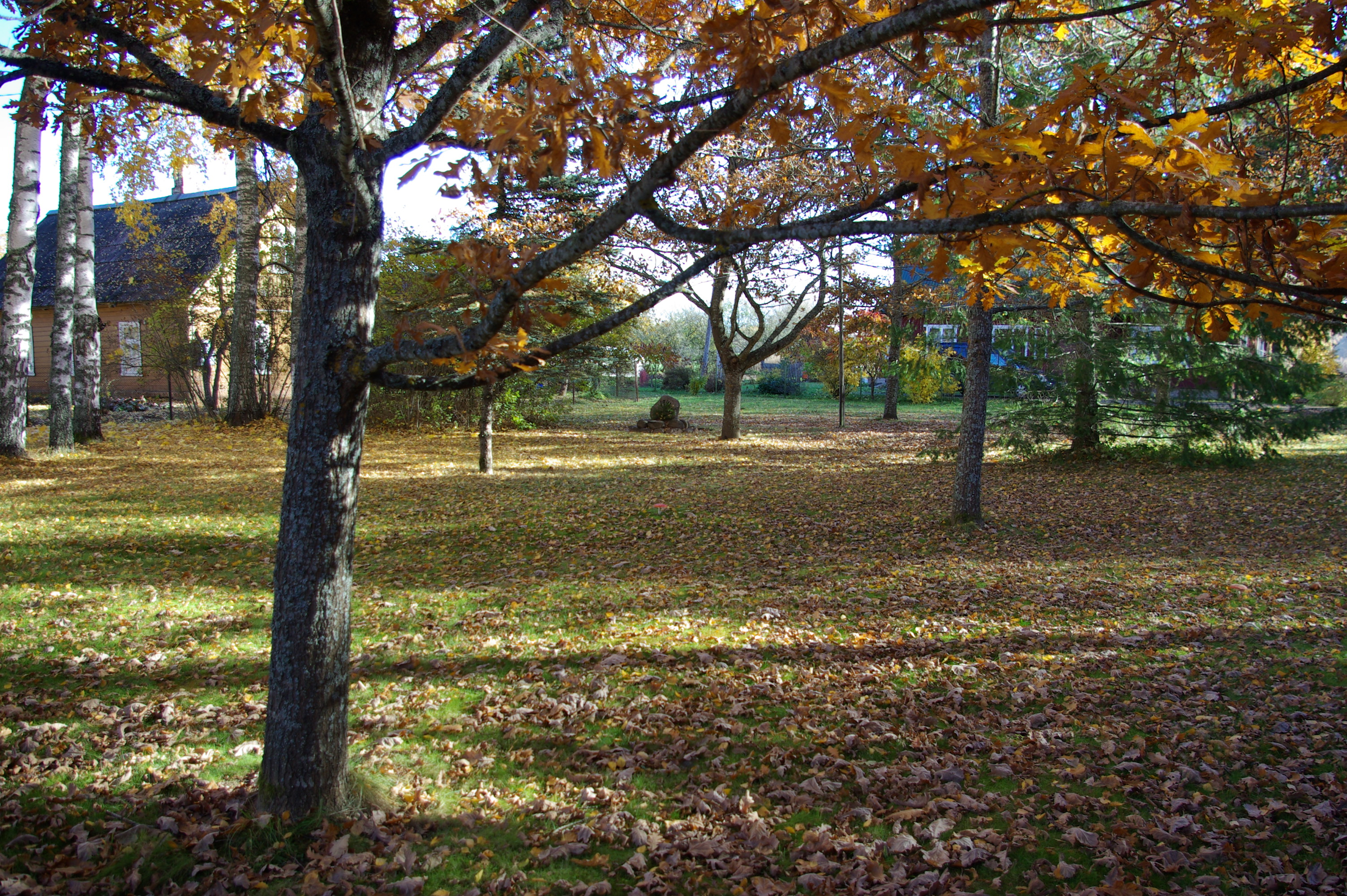 Meremäe leinapark